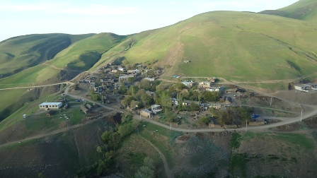 تصویری از روستا که در بهار ۹۲ اخذ شده است